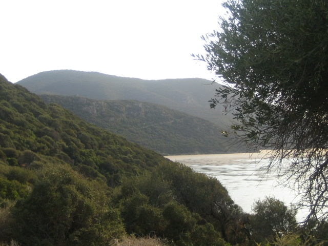 photo réalisée en aôut 2006 et offerte par Sadok GHARBI